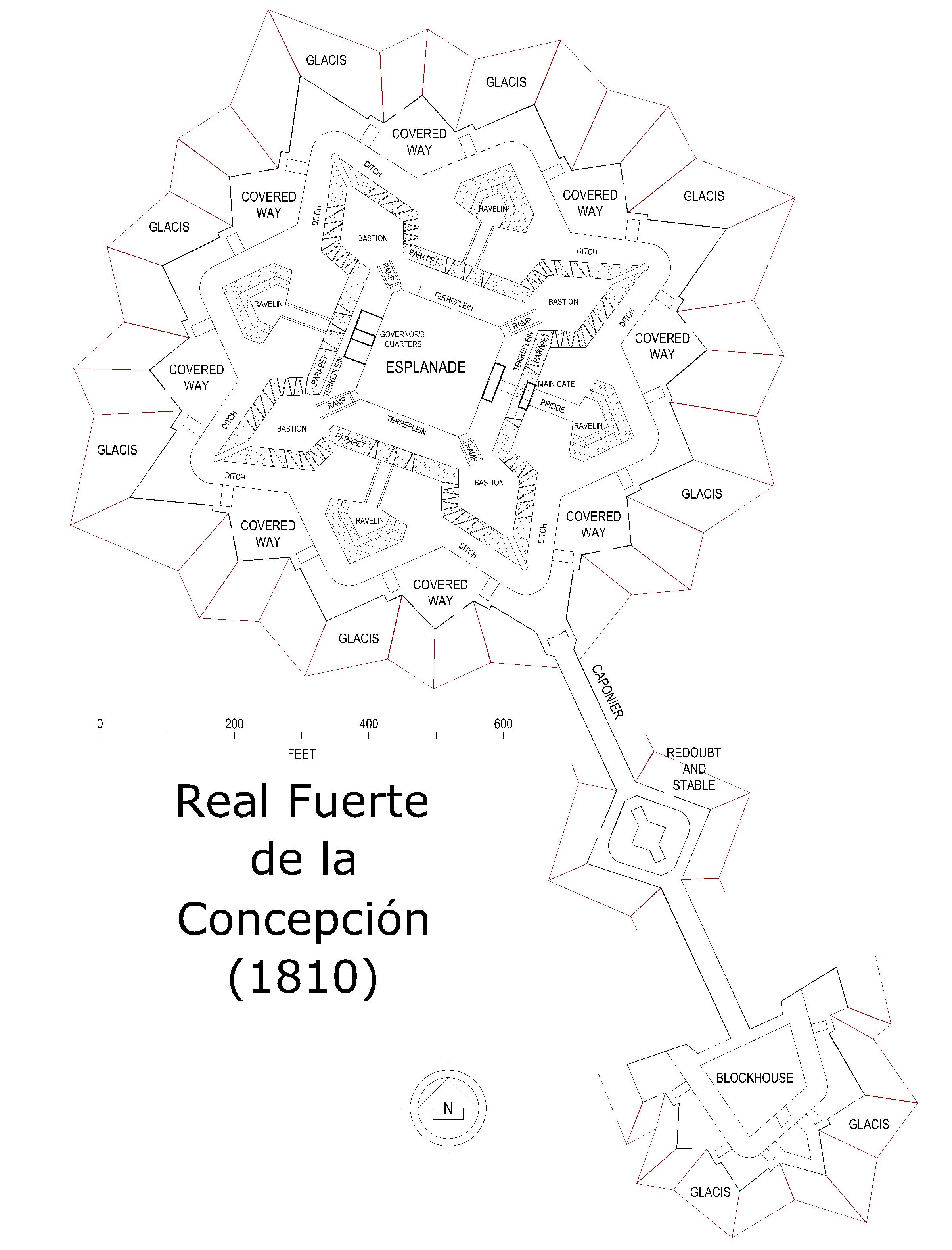 Real Fuerte de la Concepción in Spain